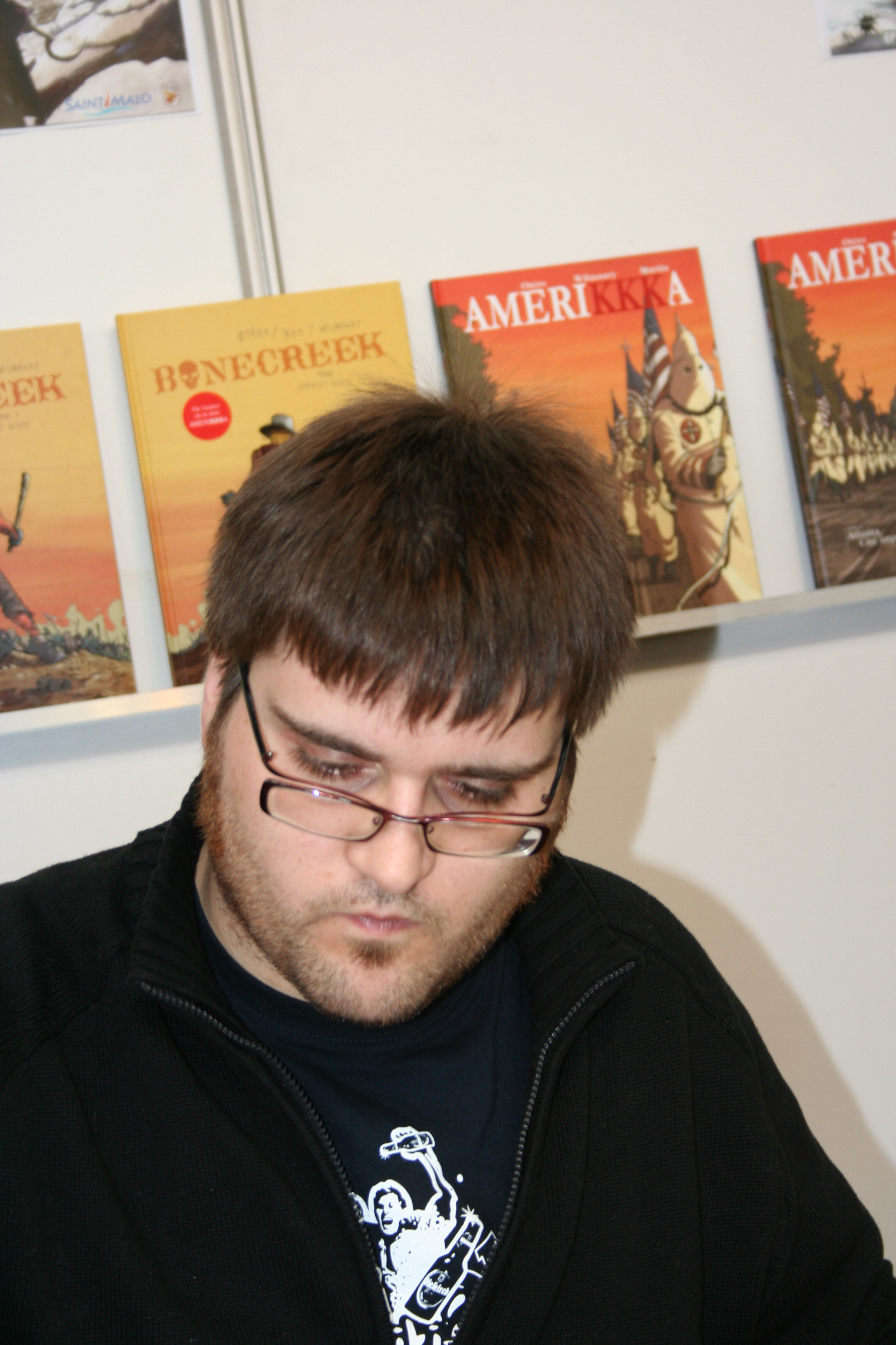 auteur de bande dessinée, lors du salon Quai des Bulles à Saint-Malo, France, en octobre 2008